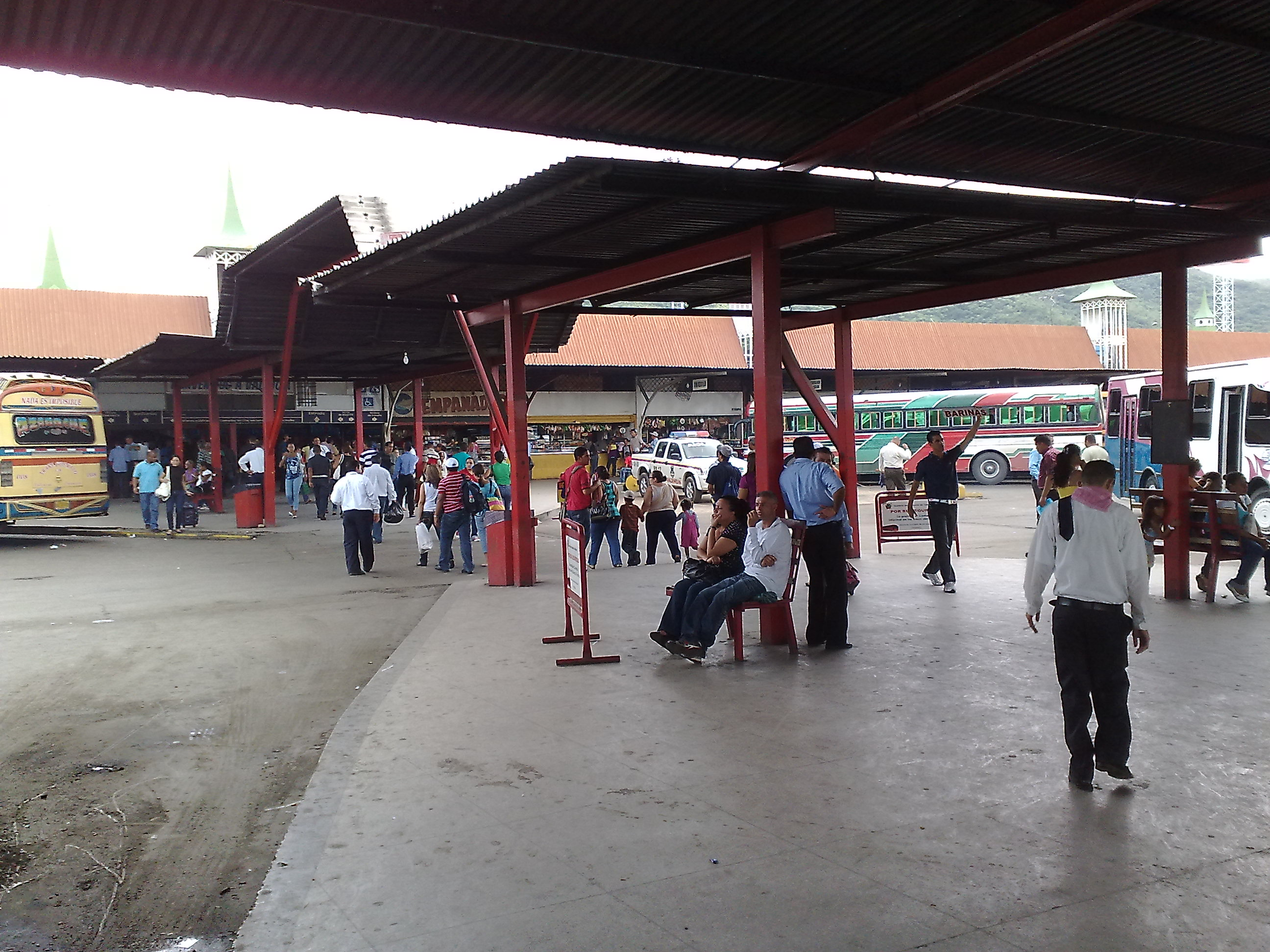 Zona de embarque del terminal de Valencia, Carabobo, Venezuela.